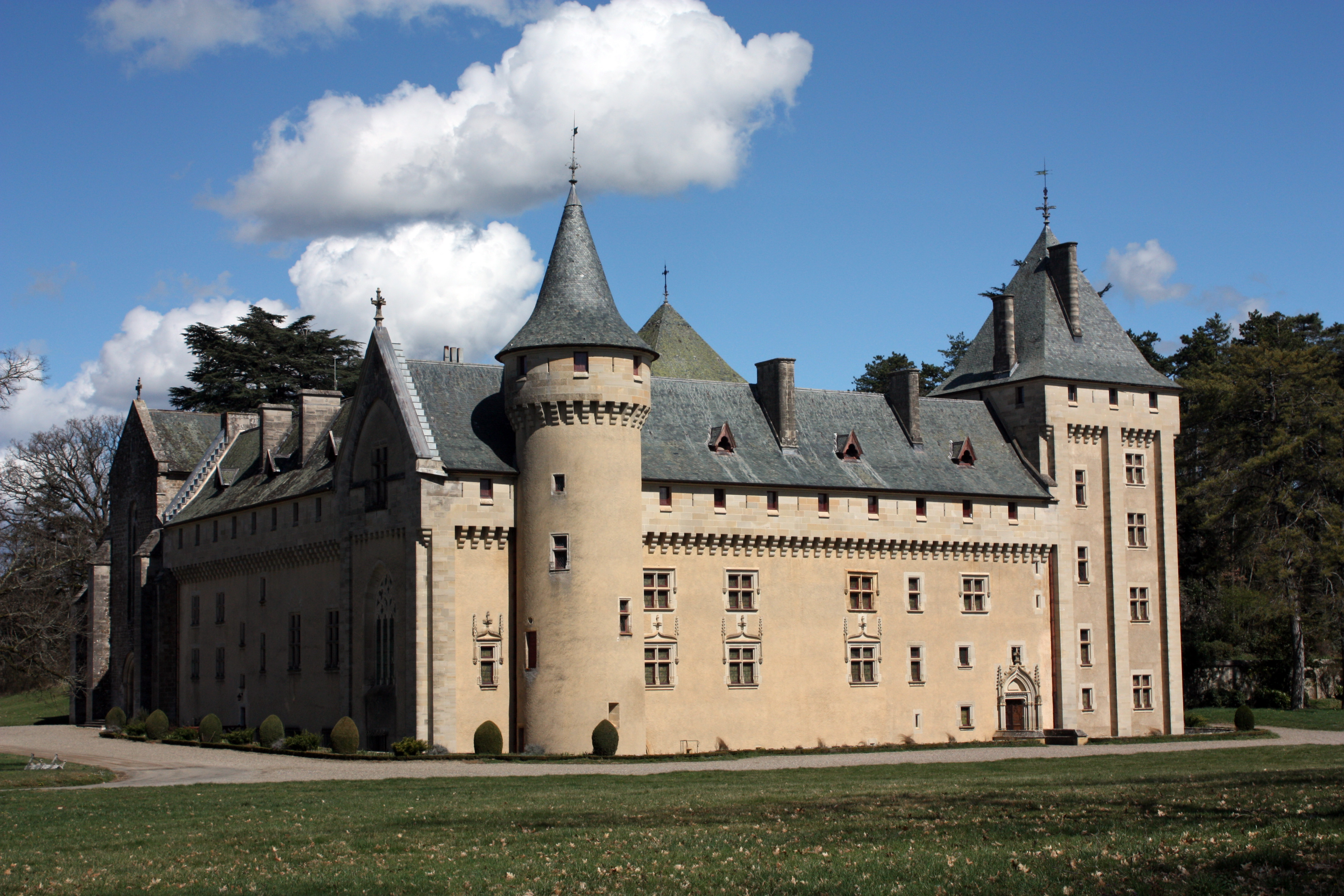 Loc-Dieu Abbey - West face.